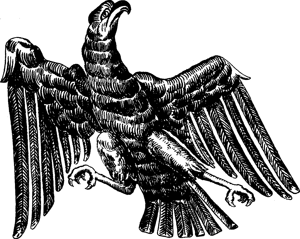 Wappen des Freistaates Preußen 1918-1933(-1947)